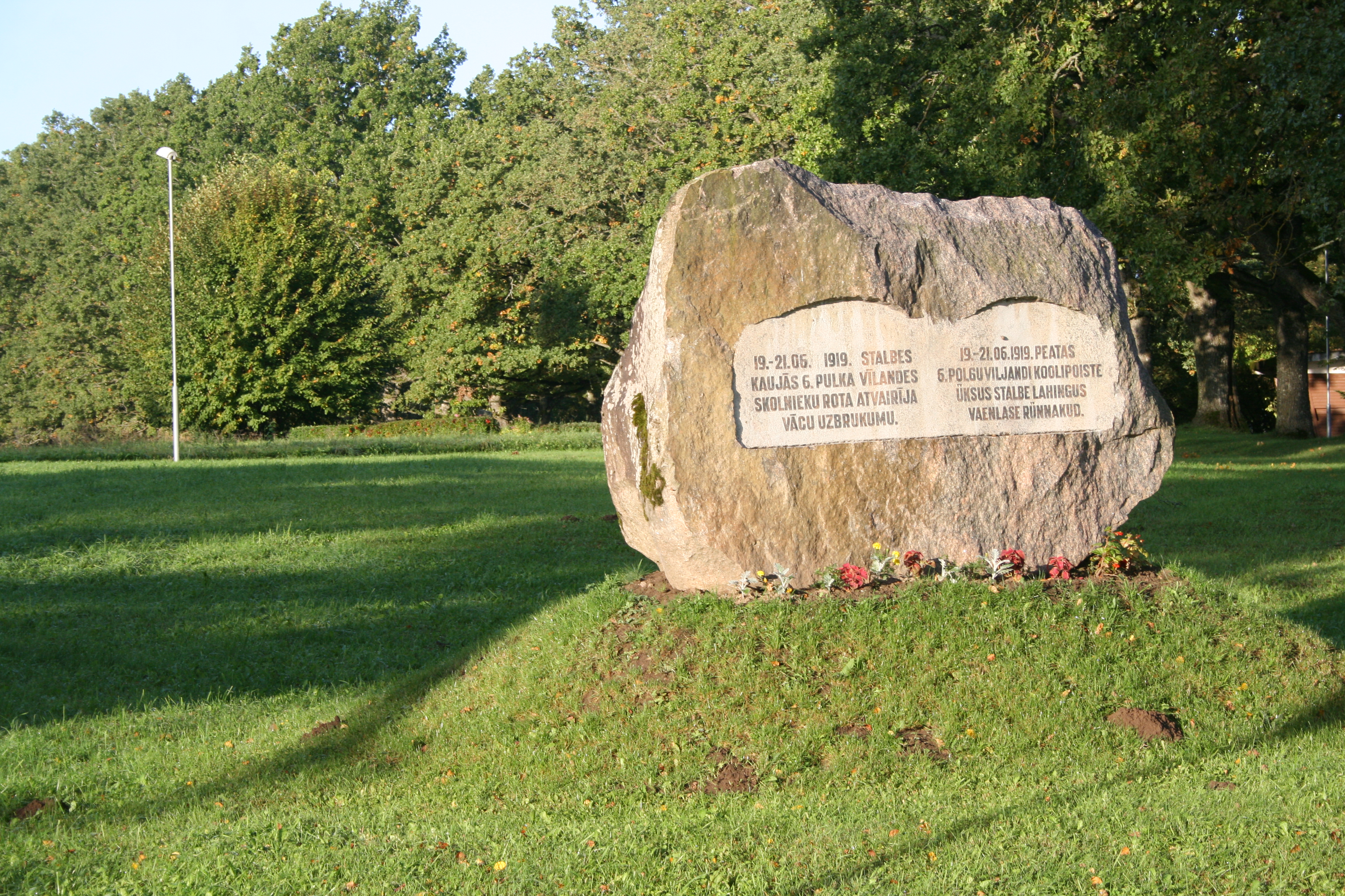 Piemineklis:1919 Stalbes kaujās 6.pulka Vīlandes skolnieku rota atvairīja vācu uzbrukumu